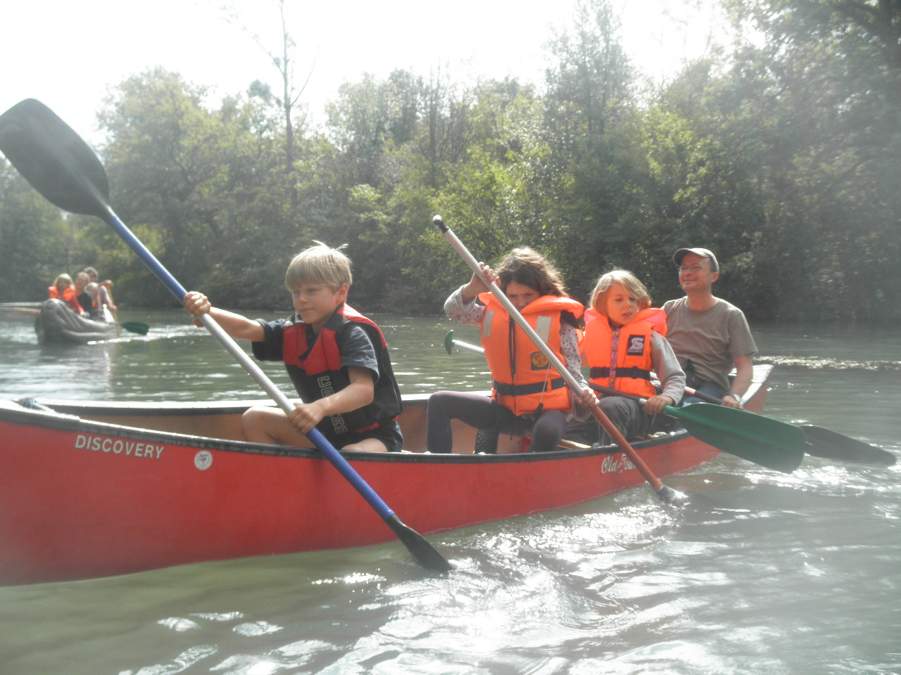 Kanuo en la natura parko Taubergießen